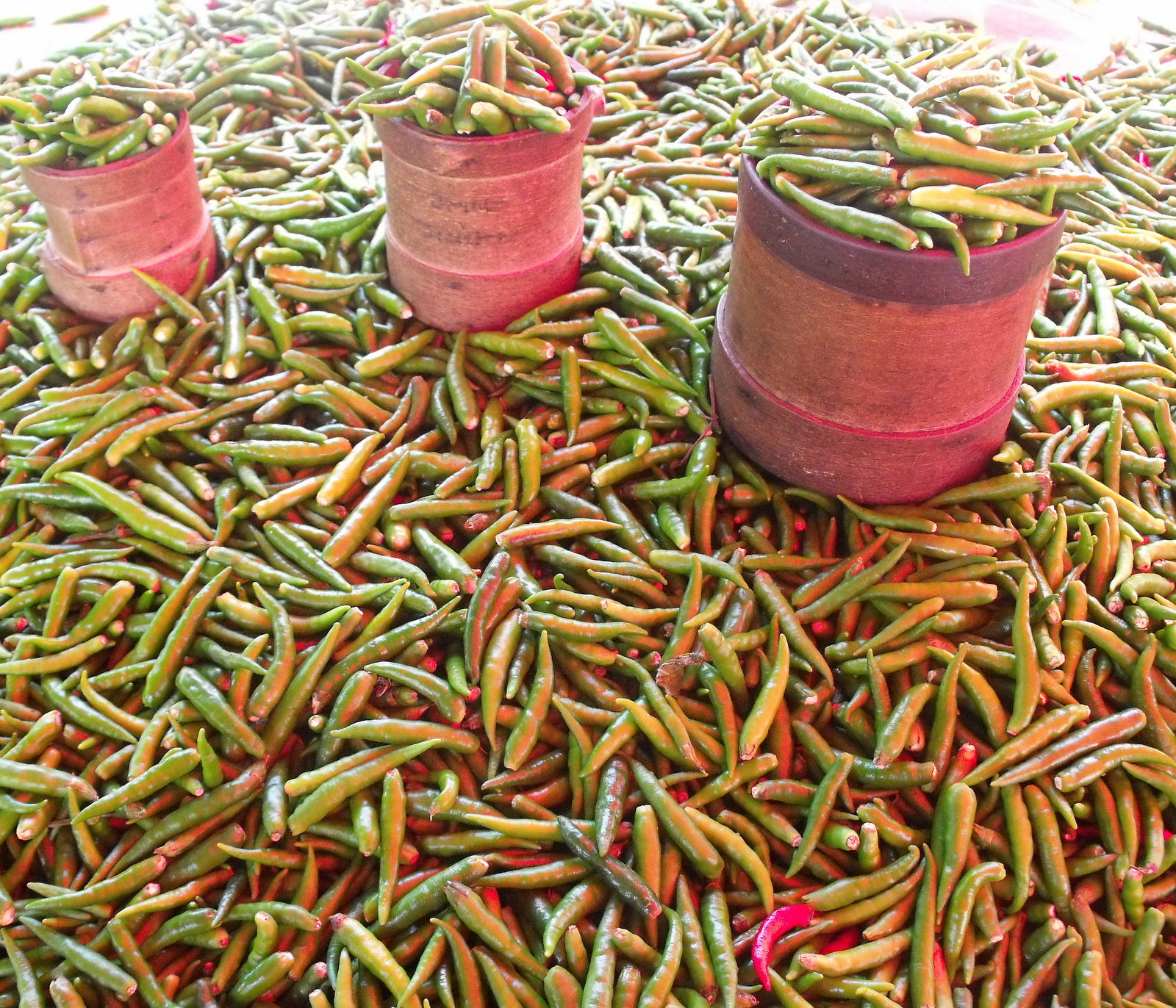 piments martin ou piments zoizeau, marché de Saint-Pierre île de la Réunion